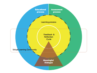 Ontwerpprincipes met leerresultaten